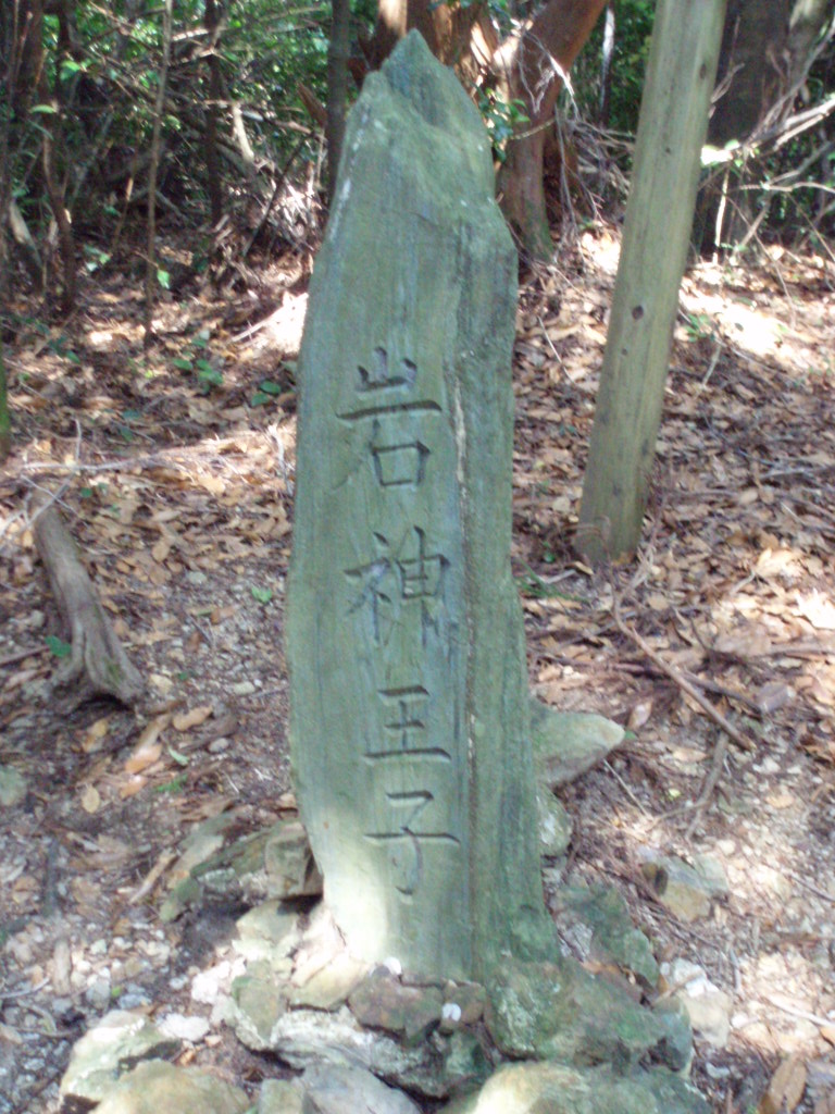 Monument_IWAGAMI-oji_remains